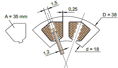 Darstellung der geometrischen Verhältnisse bei der Bestimmung des mechanischen Füllfaktors